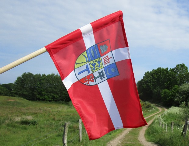 Dannebrog med Angels våbenskjold